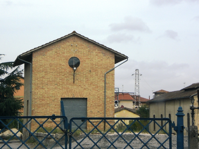 Il dismesso magazzino merci della stazione di Buonconvento